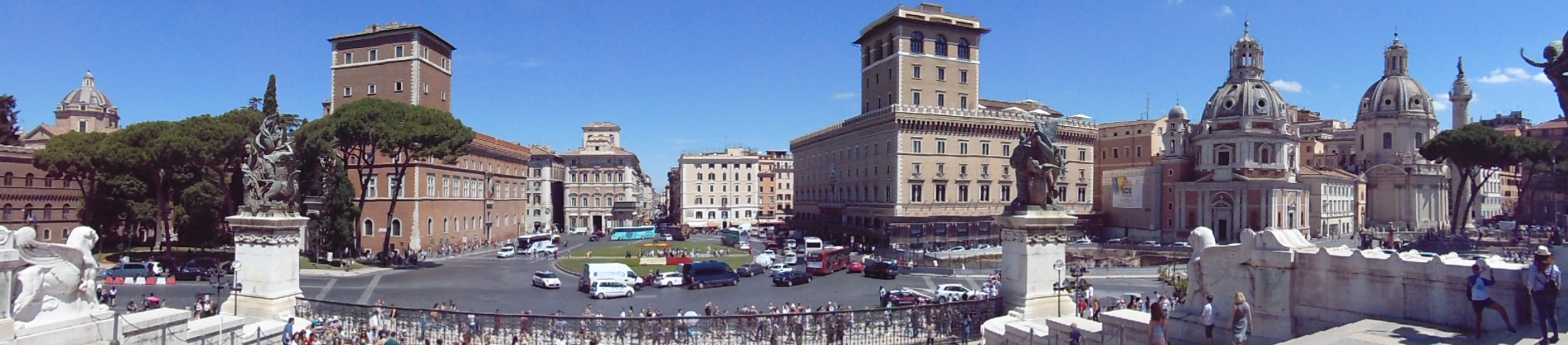 Chiesa del Santissimo Nome di Maria al Foro Traiano